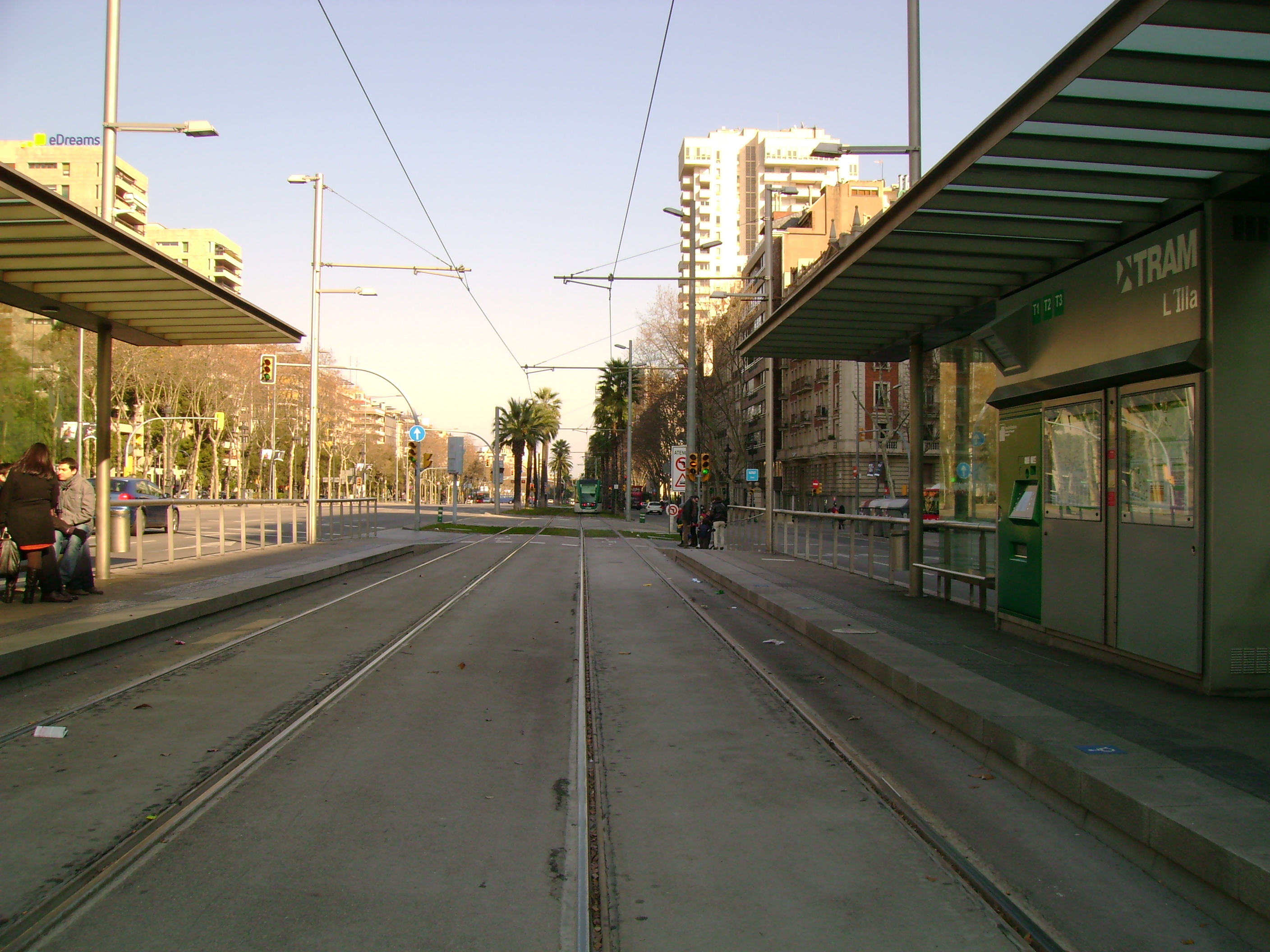 Foto capturada per la meva càmara a l'estació de l'Illa (Trambaix).